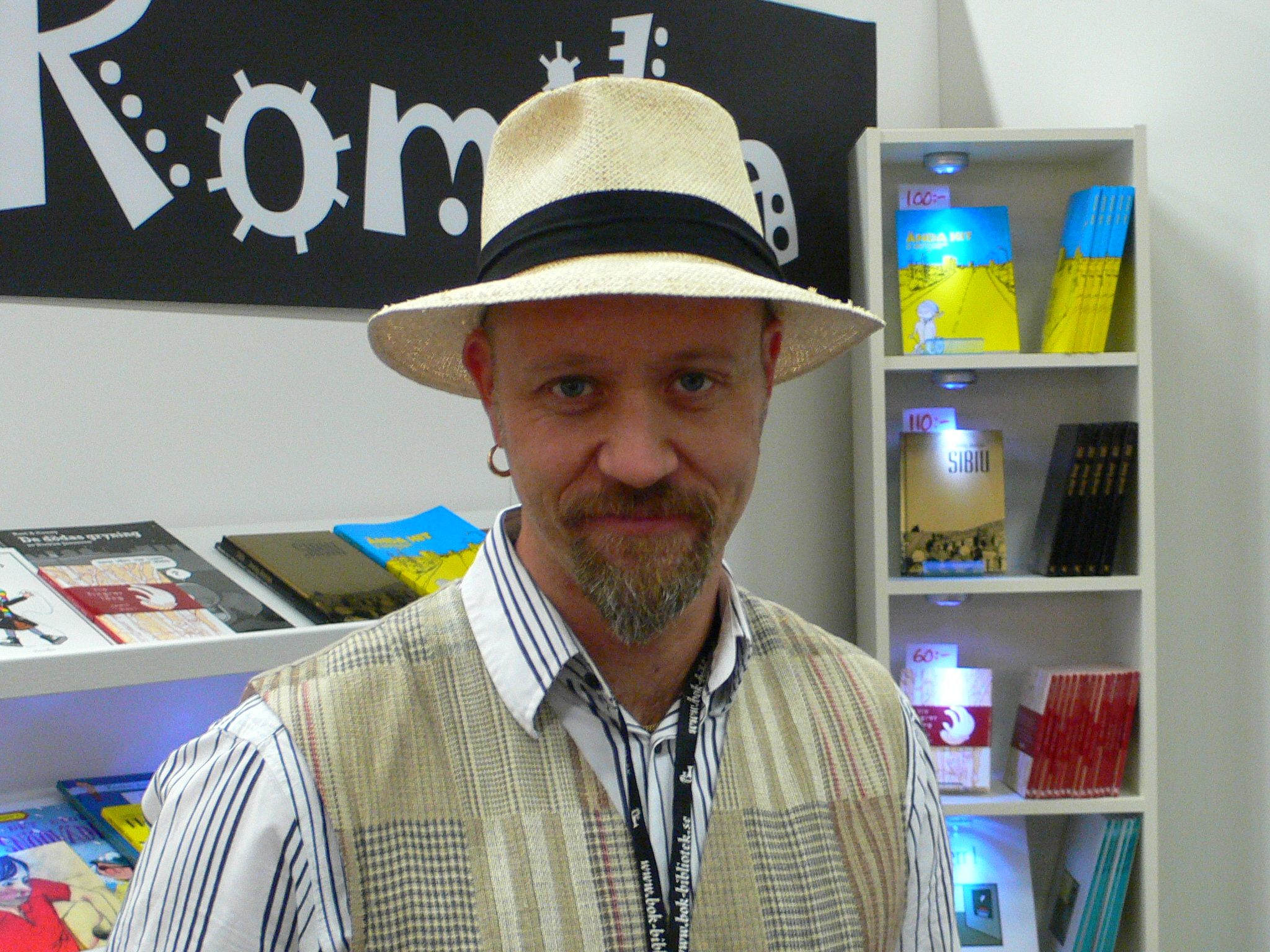 Fredrik Strömberg at Gothenburg Book Fair 2007, Fredrik Strömberg på Bok- och biblioteksmässan 2007